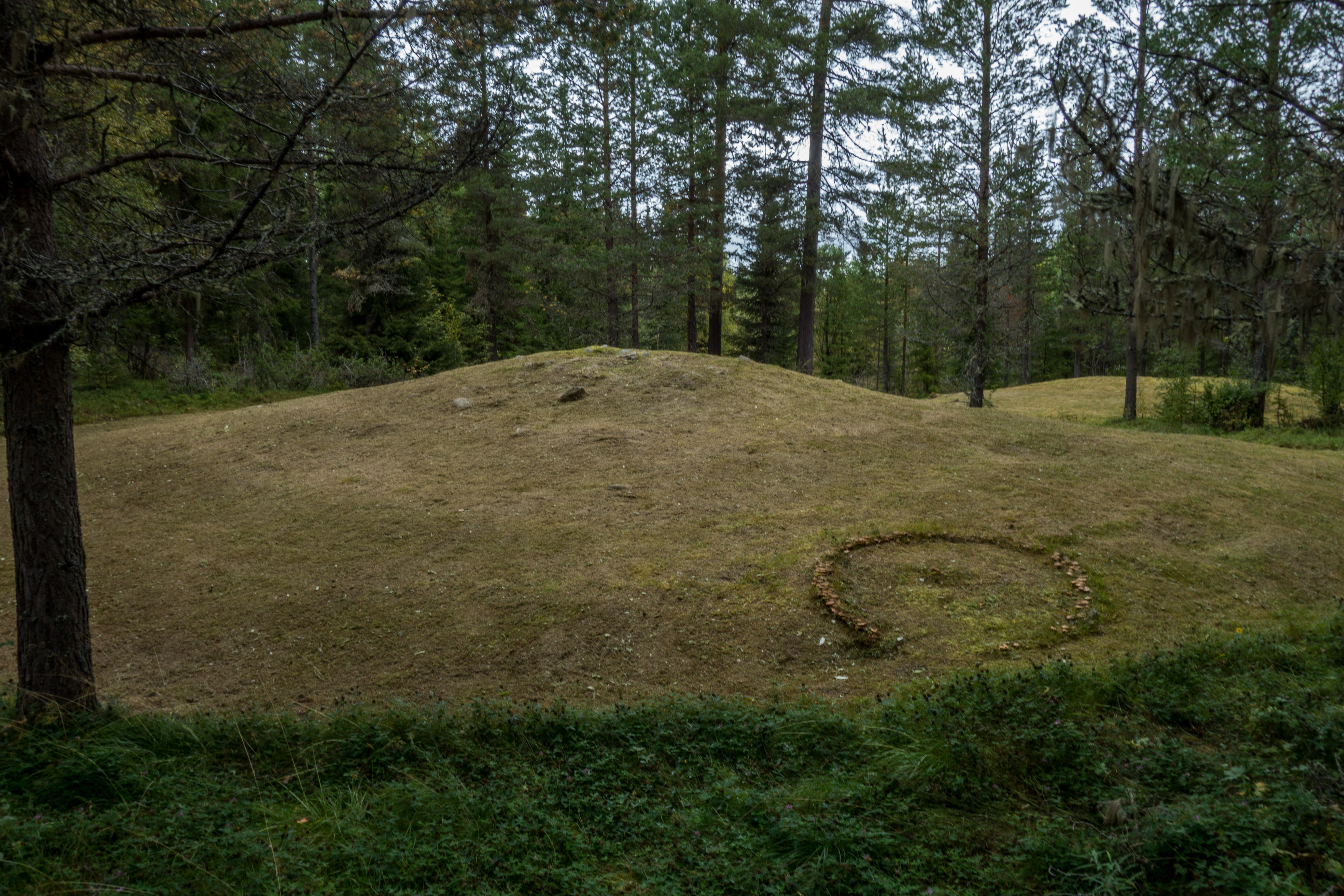 (Rödön 29:1, Gravfält) På bilden syns även en Häxring av svampar